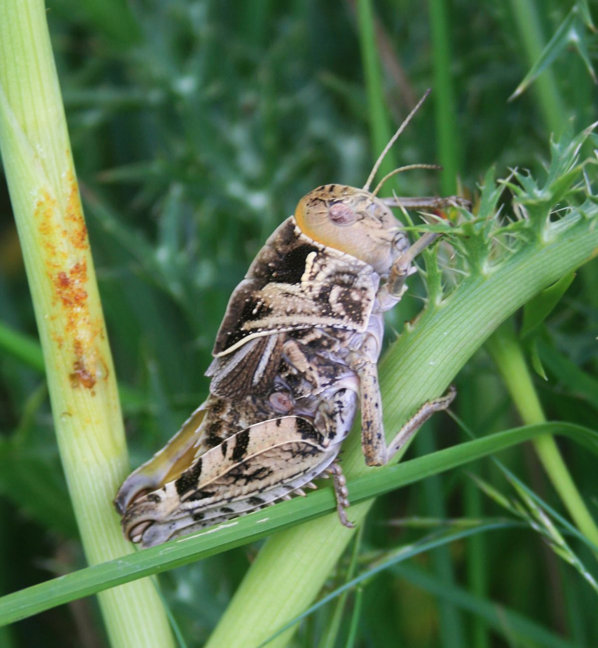 Gesägte Steinschrecke (Prionotropis hystrix), Steinschrecken (Pamphagidae) - Slowenien/Slovenija/Slovenia: Primorska, "Prärie" NNW Praproče